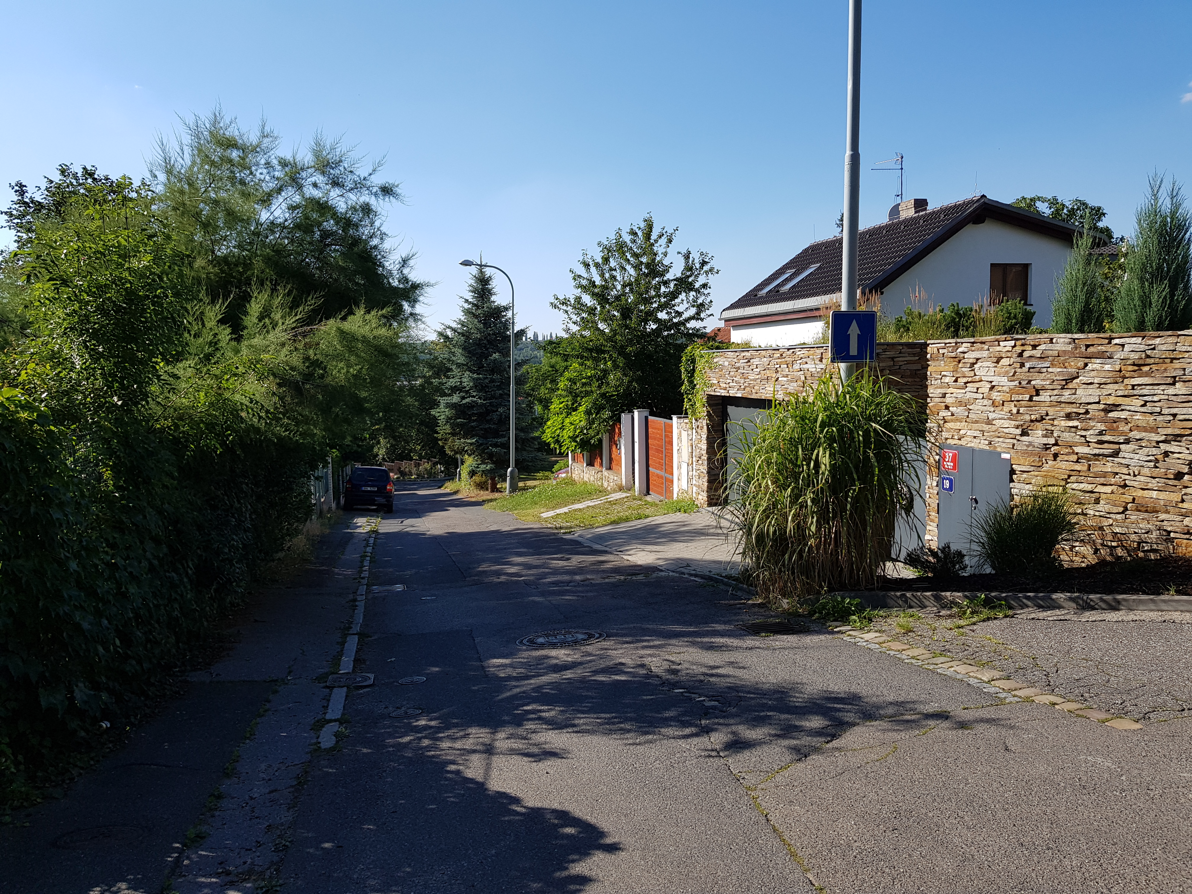 Kyjská ulice, Praha 14-Hloubětín, pohled od ulice Hostavické směrem na sever